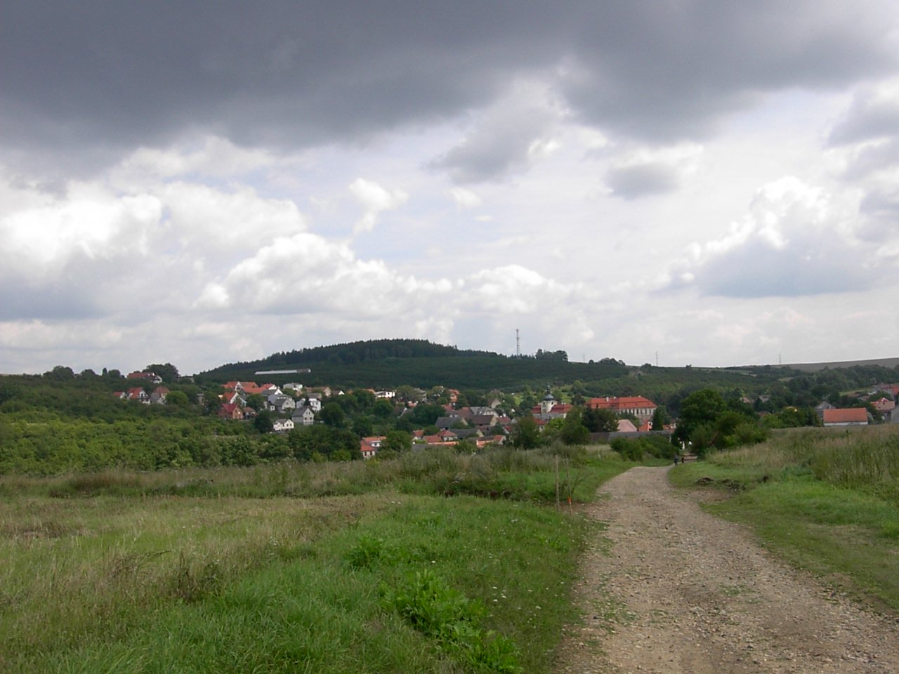 Celkový pohled na obec Nebílovy (PJ).